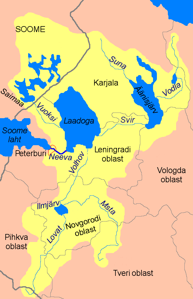 Kollasega on tähistatud Neeva ja Laadoga järve valgla